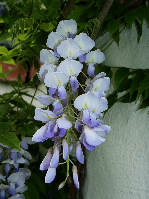 Wisteria sinensis